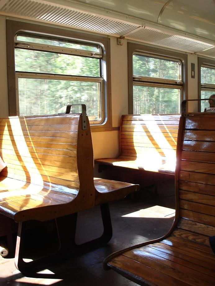 Электричка. Внутри. (Suburban train/Saint-Petersburg, Russia)